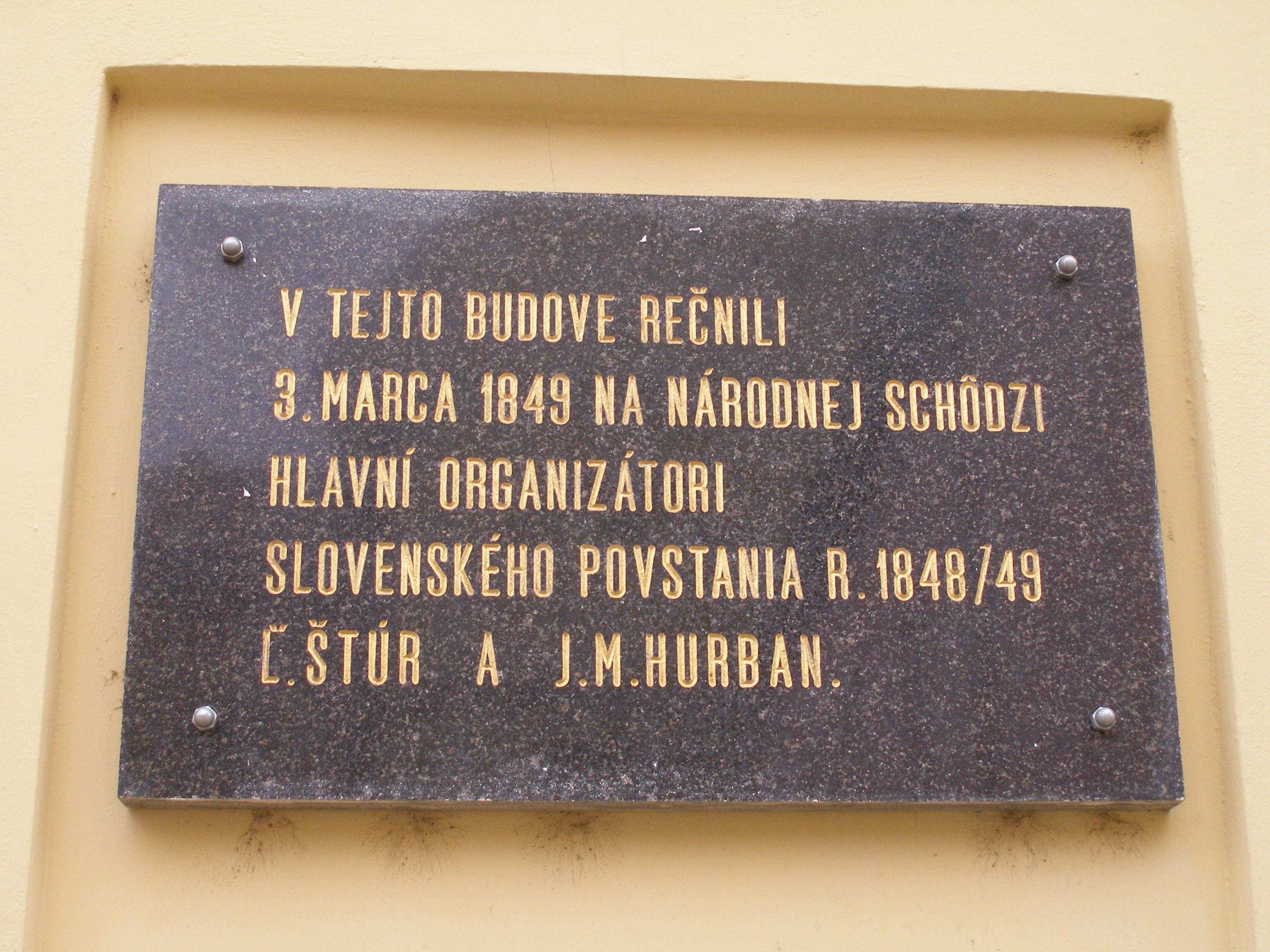 Mesto Prešov pamätihodnosti